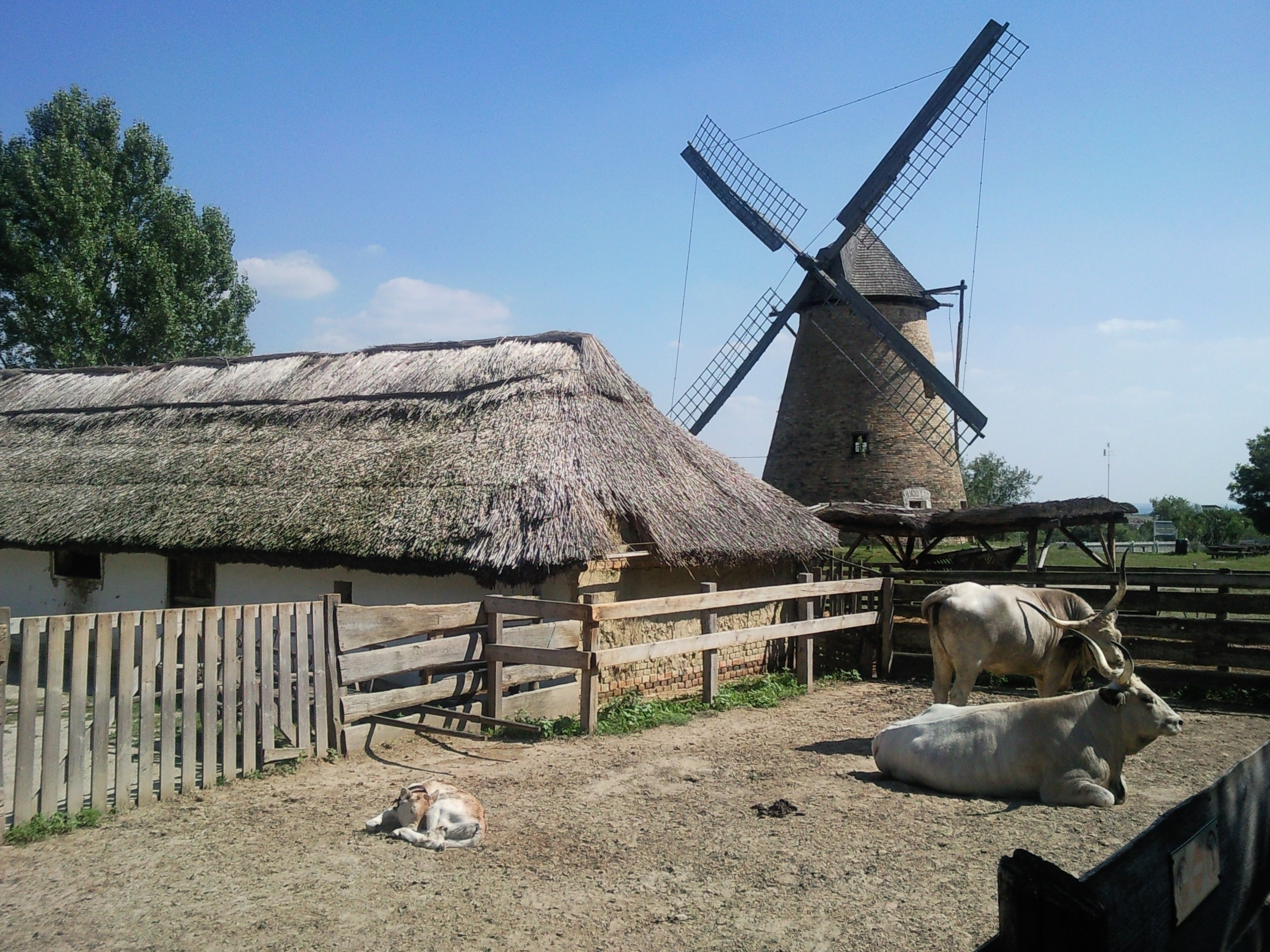 Szentendre, Hungary